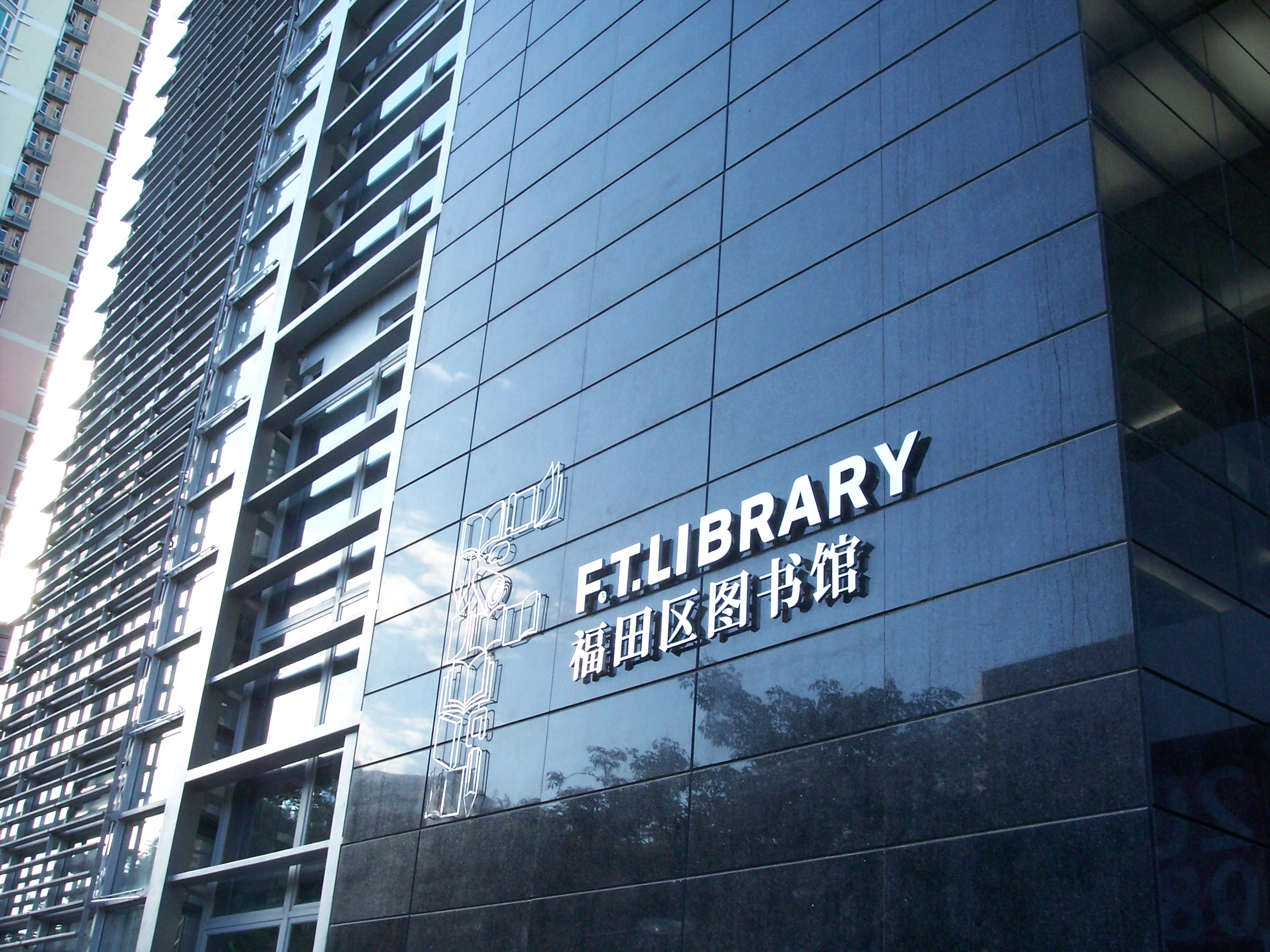 粵語: 廣東深圳福田區圖書館